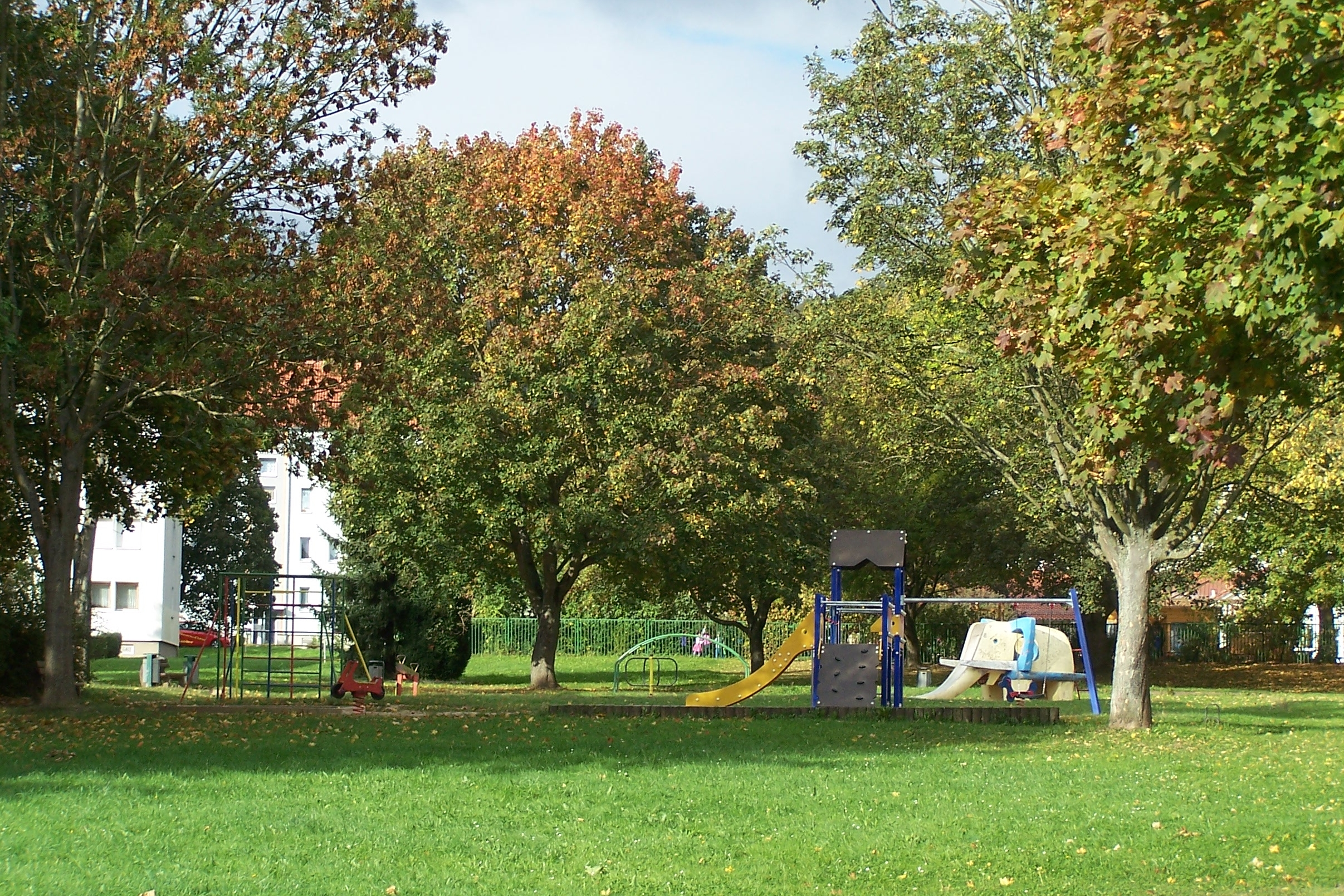 Öffentliche Grünanlage und Spielplatz in der Wilhelm-Pieck-Straße.